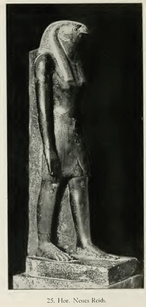 Horus